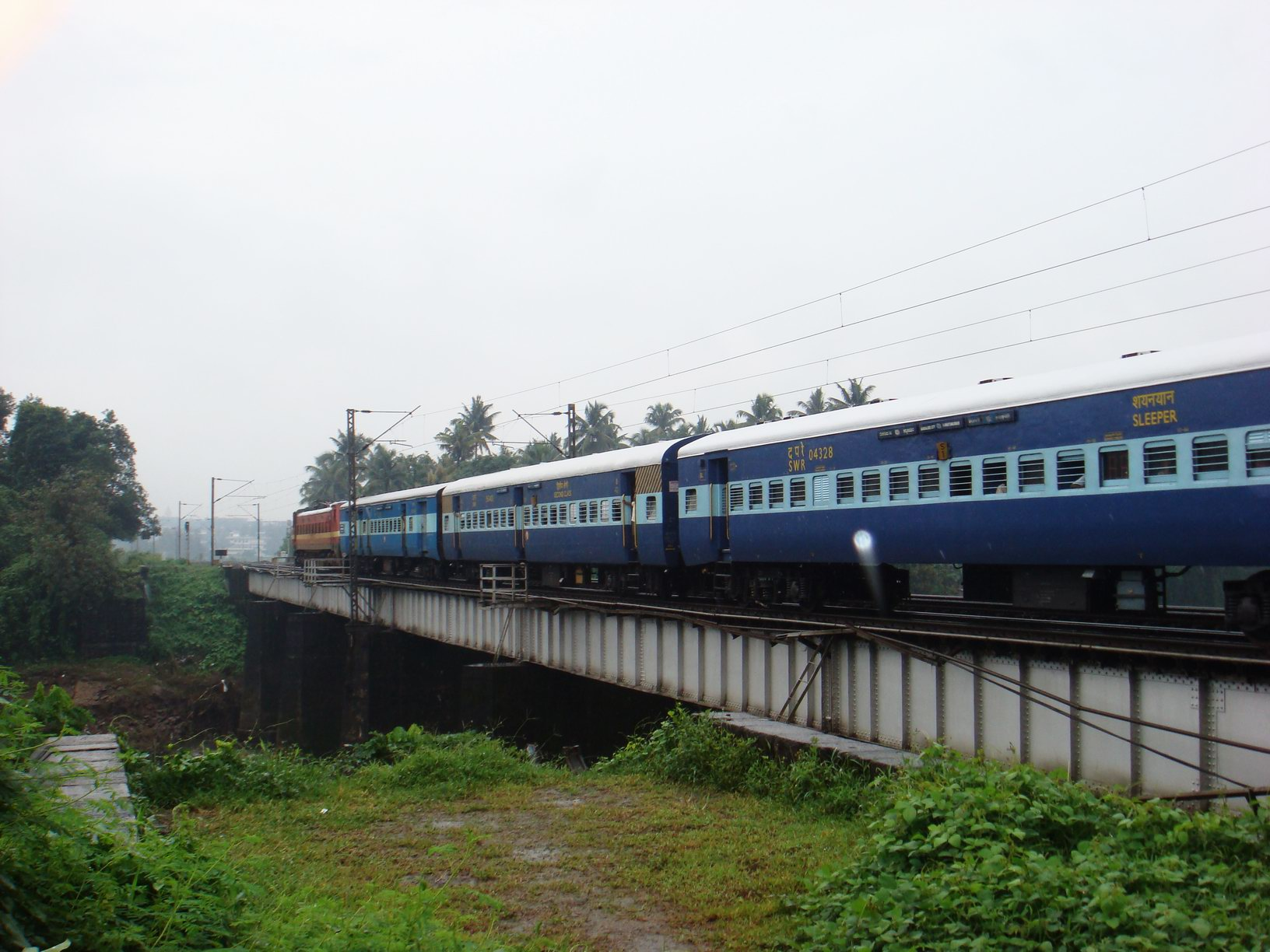 ചാലക്കുടി-റെയില്‌വേ-പാലം